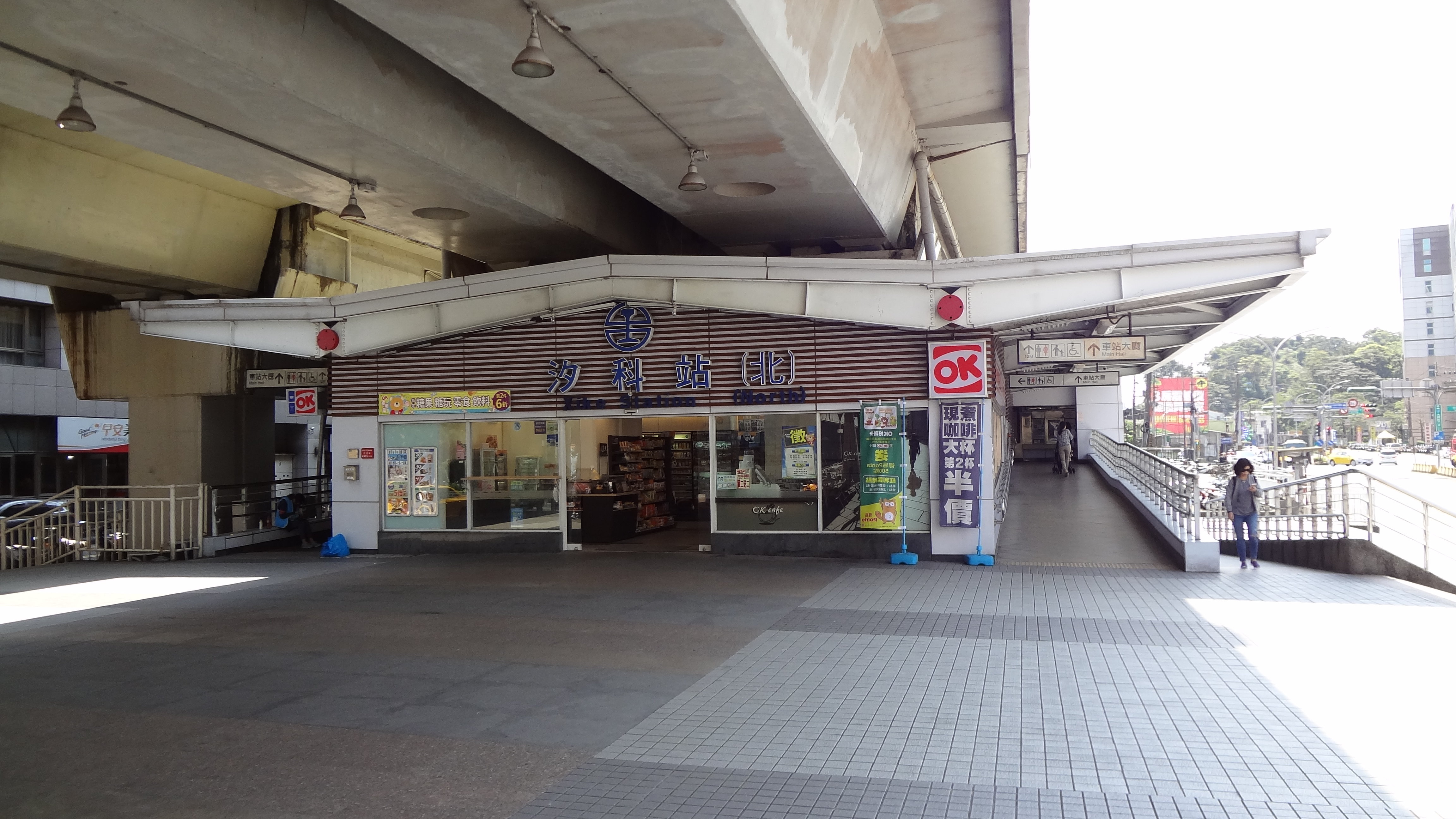 臺灣鐵路管理局汐科車站北口。